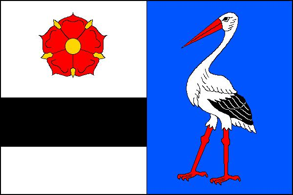 Vlajka obce Velký Třebešov